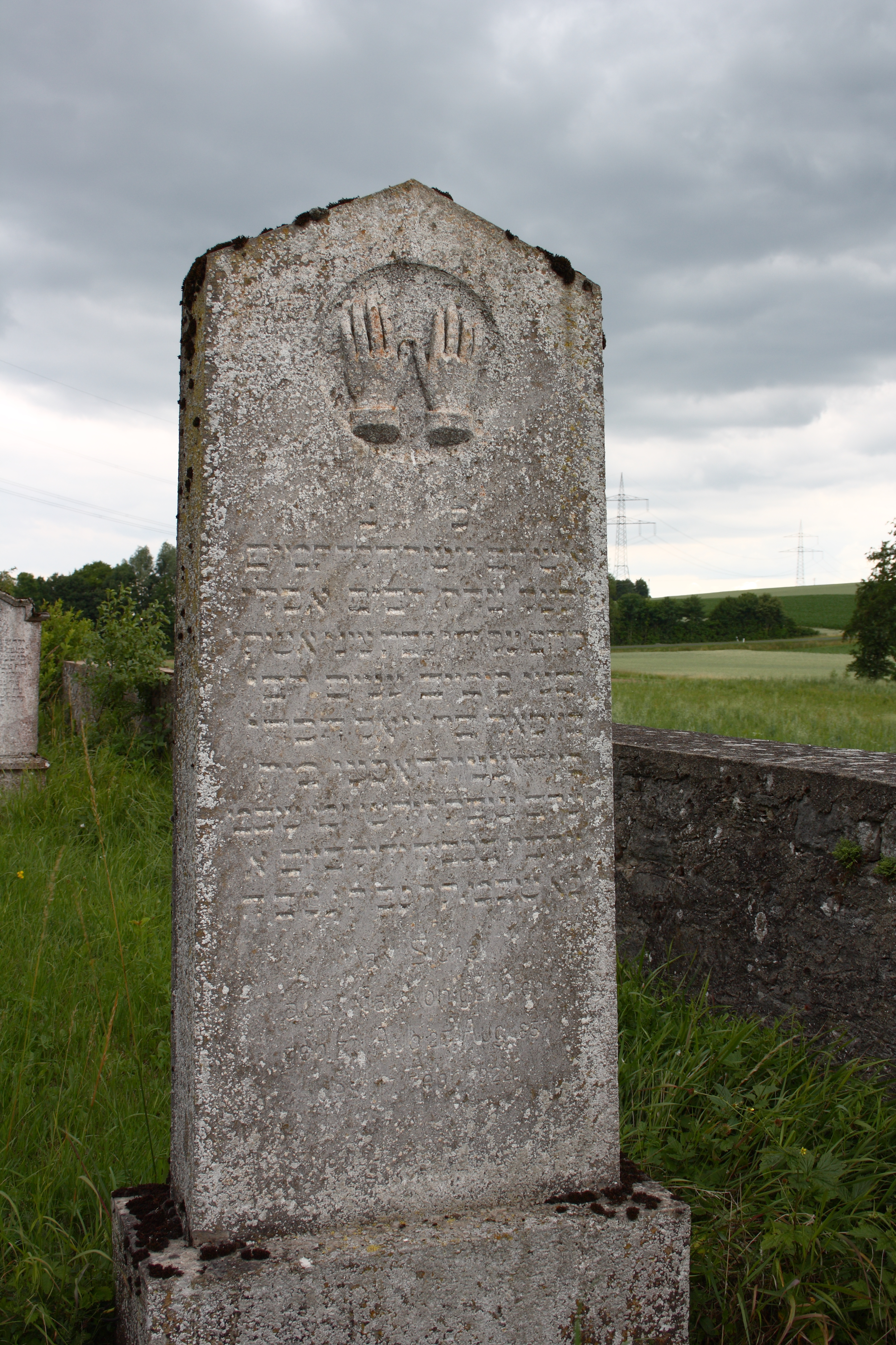 Jüdischer Friedhof in Allersheim in Bayern